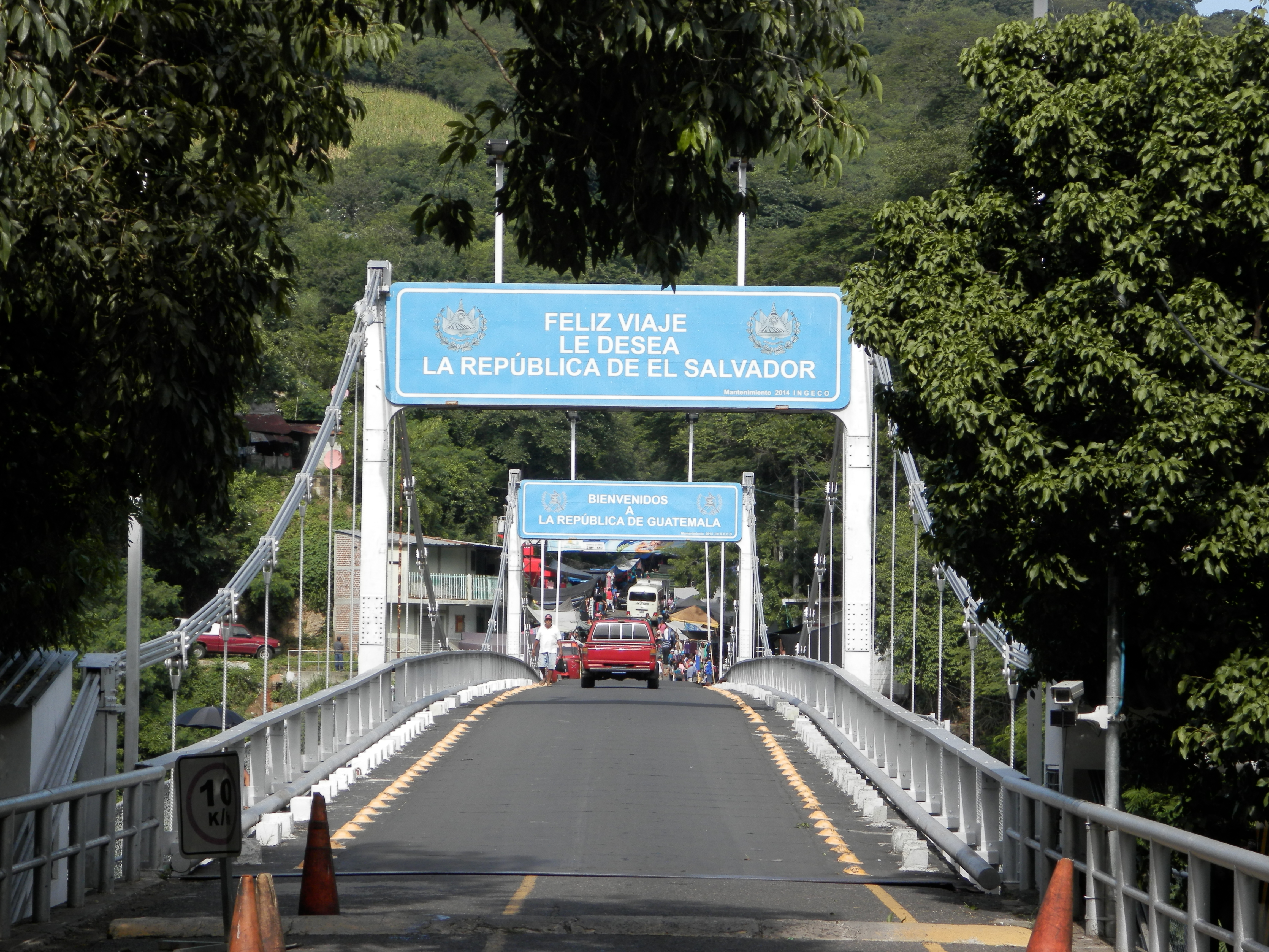 Vista del Puente